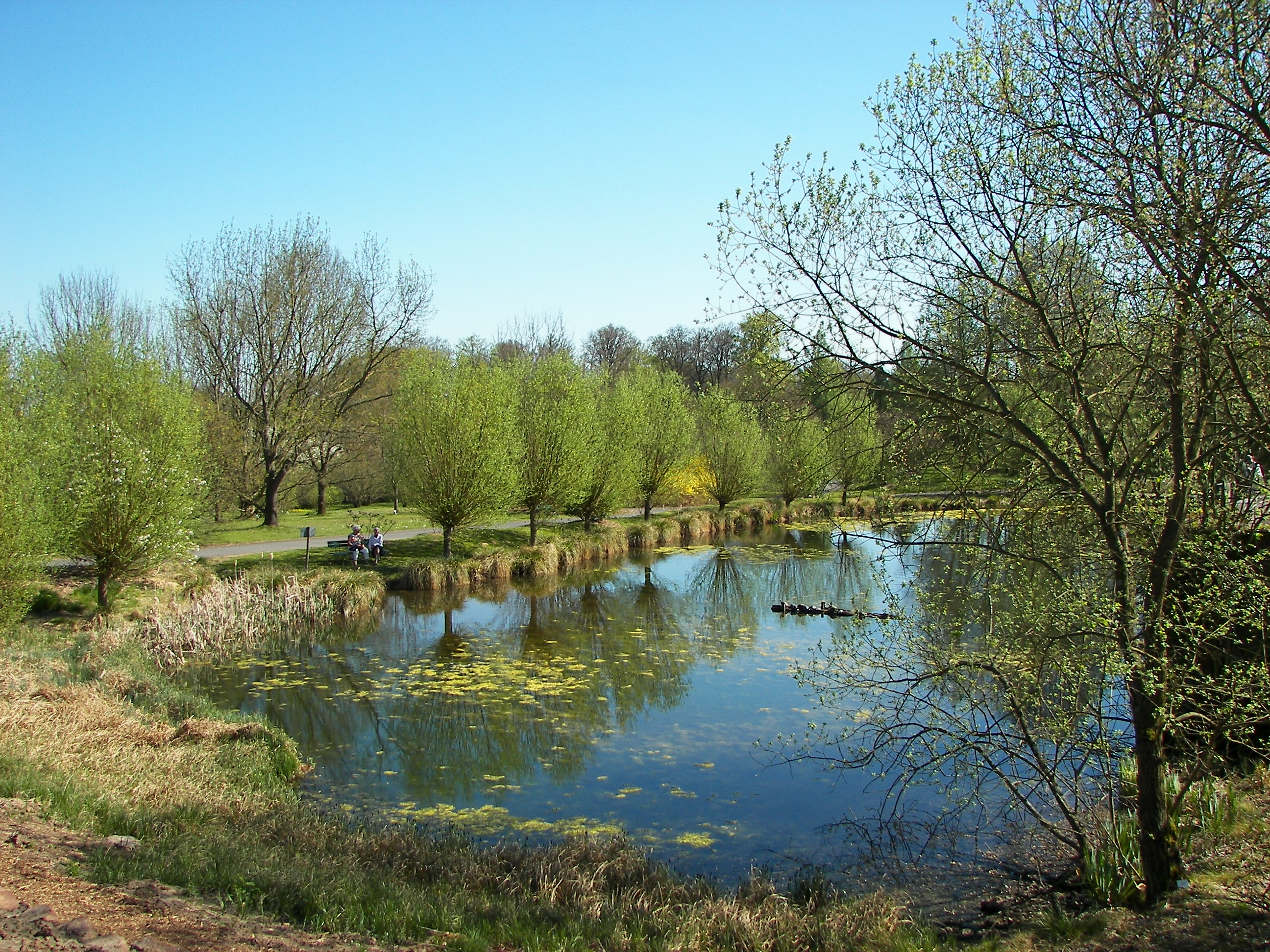 Teich im Neuen Botanischen Garten Marburg